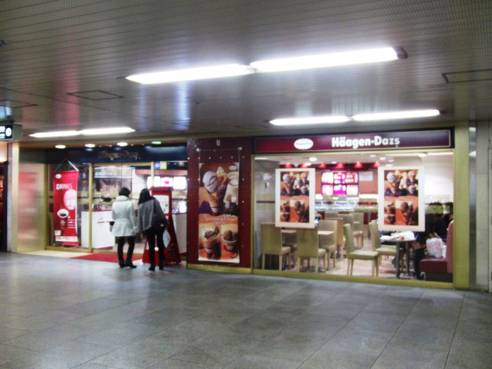 梅田駅構内にあるハーゲンダッツショップを撮影